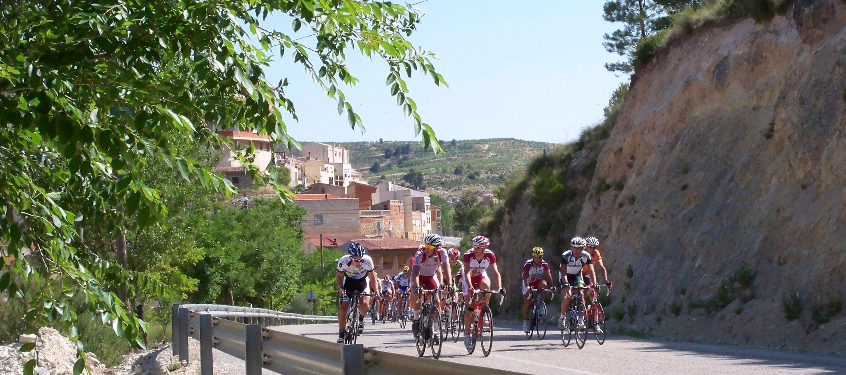 Imágen del campeonato de España sub-20 a su paso por Molinicos (Albacete)